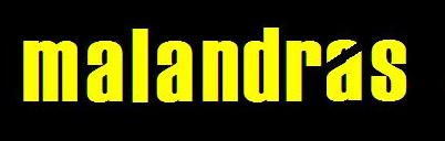 Logo de la serie argentina Malandras.